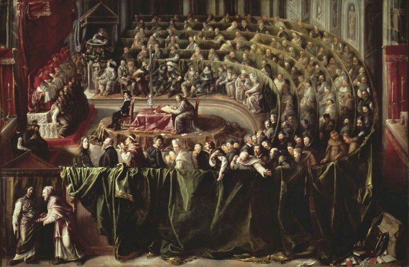 Il concilio di Trento